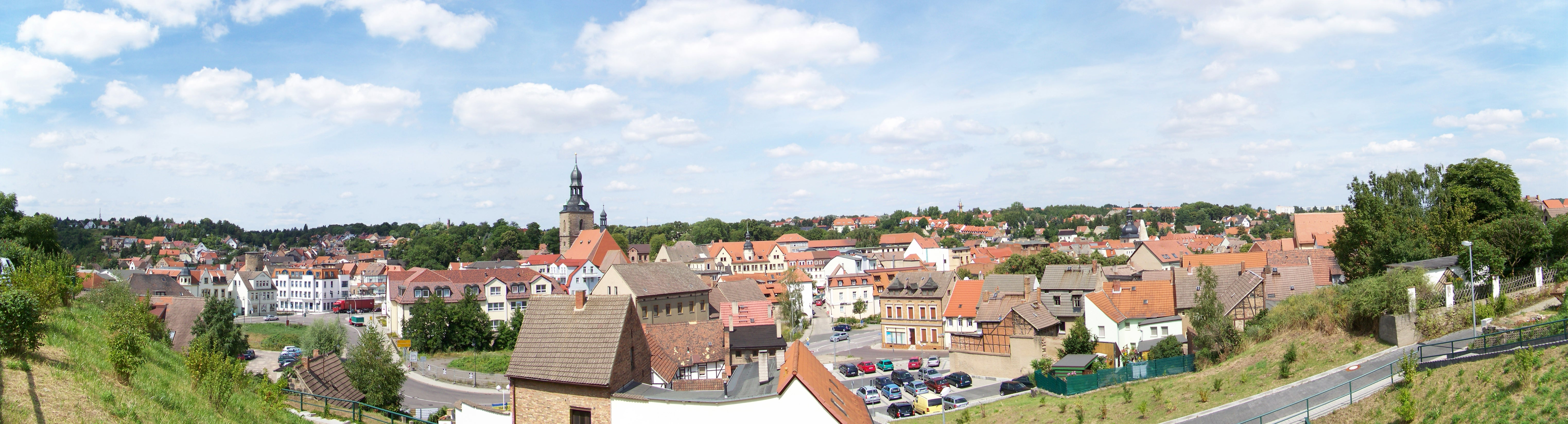 Panoramablick über Hettstedt